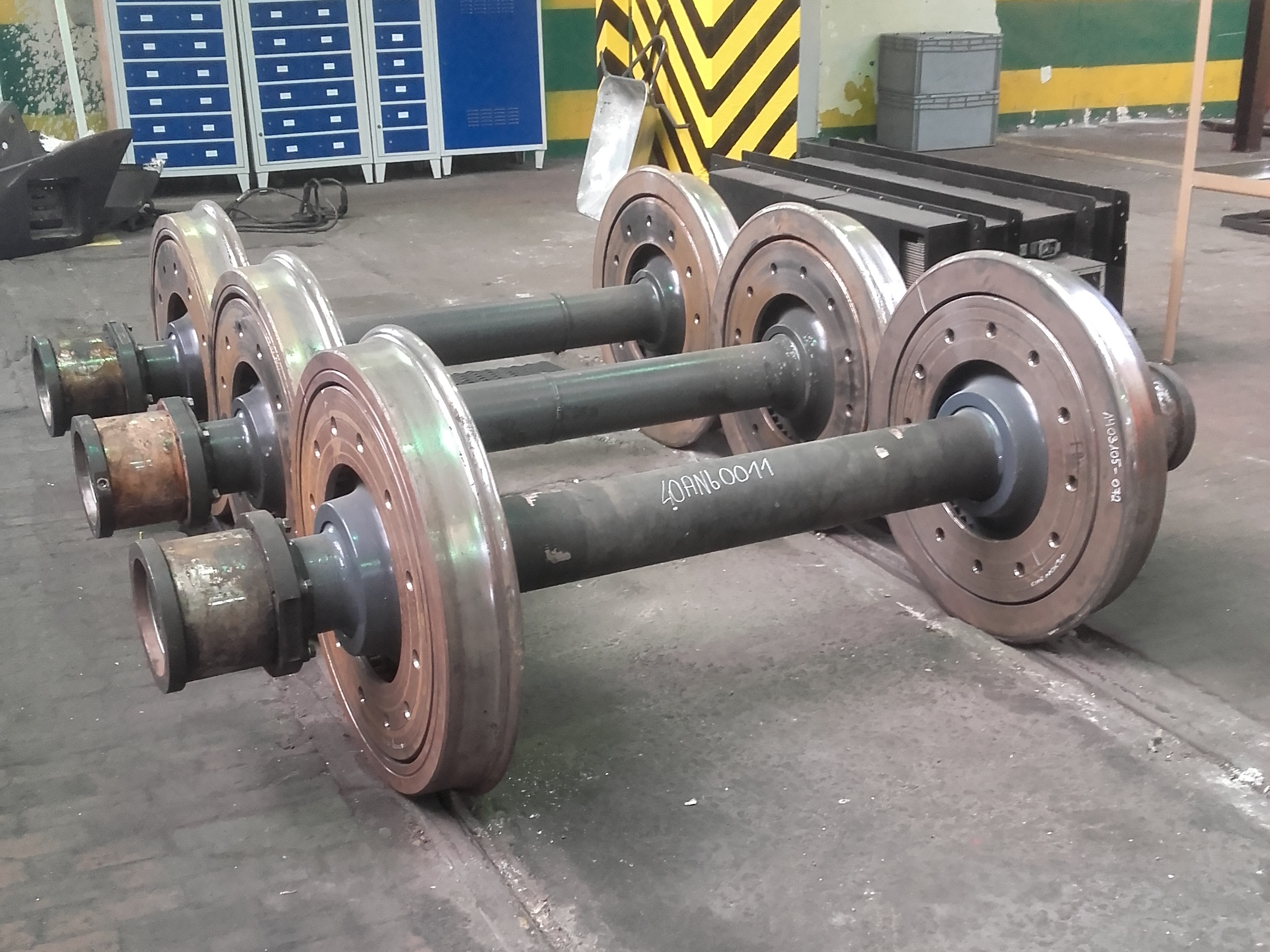 Zestaw kołowy 40ANb wywiązany z elektrycznego zespołu trakcyjnego Kolei Śląskich. Posterunek Rewizji Technicznej Łazy.